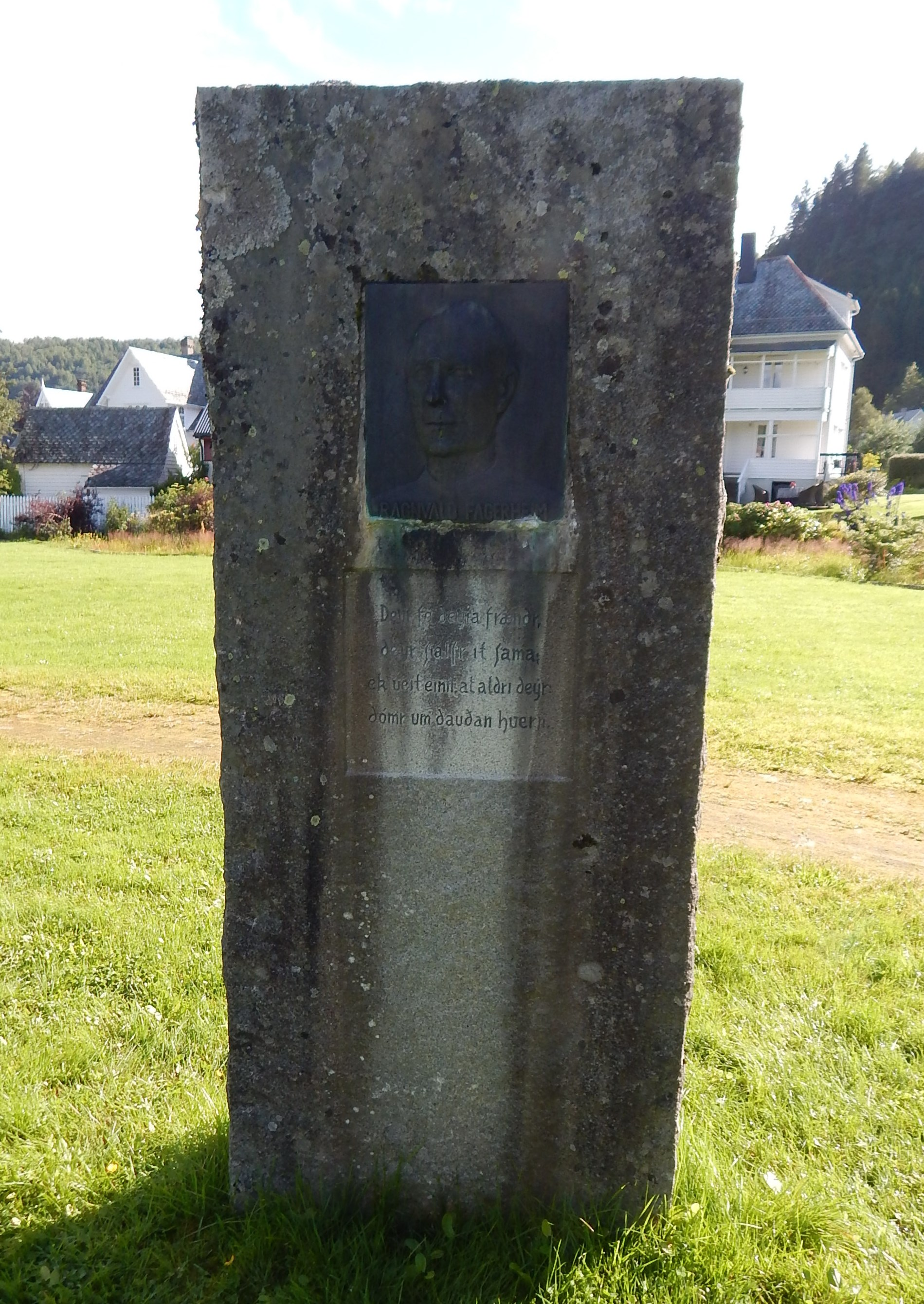 Minnesmerke (i Dale i Fjaler) over Ragnvald Fagerheim (1883–1961), lærer og ordfører i Fjaler.